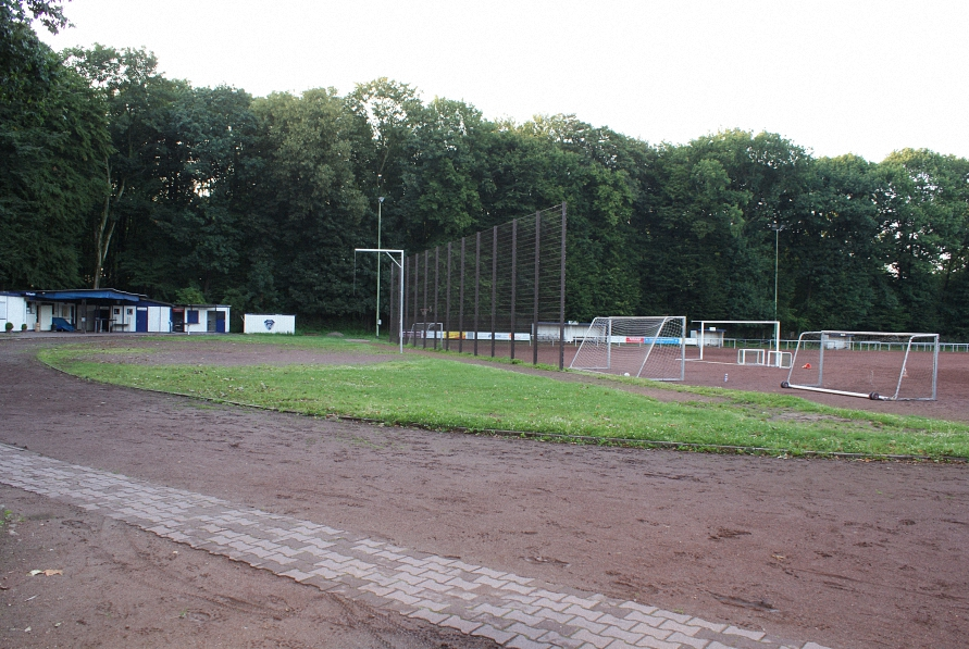 So sah die Anlage vor dem Umbau aus